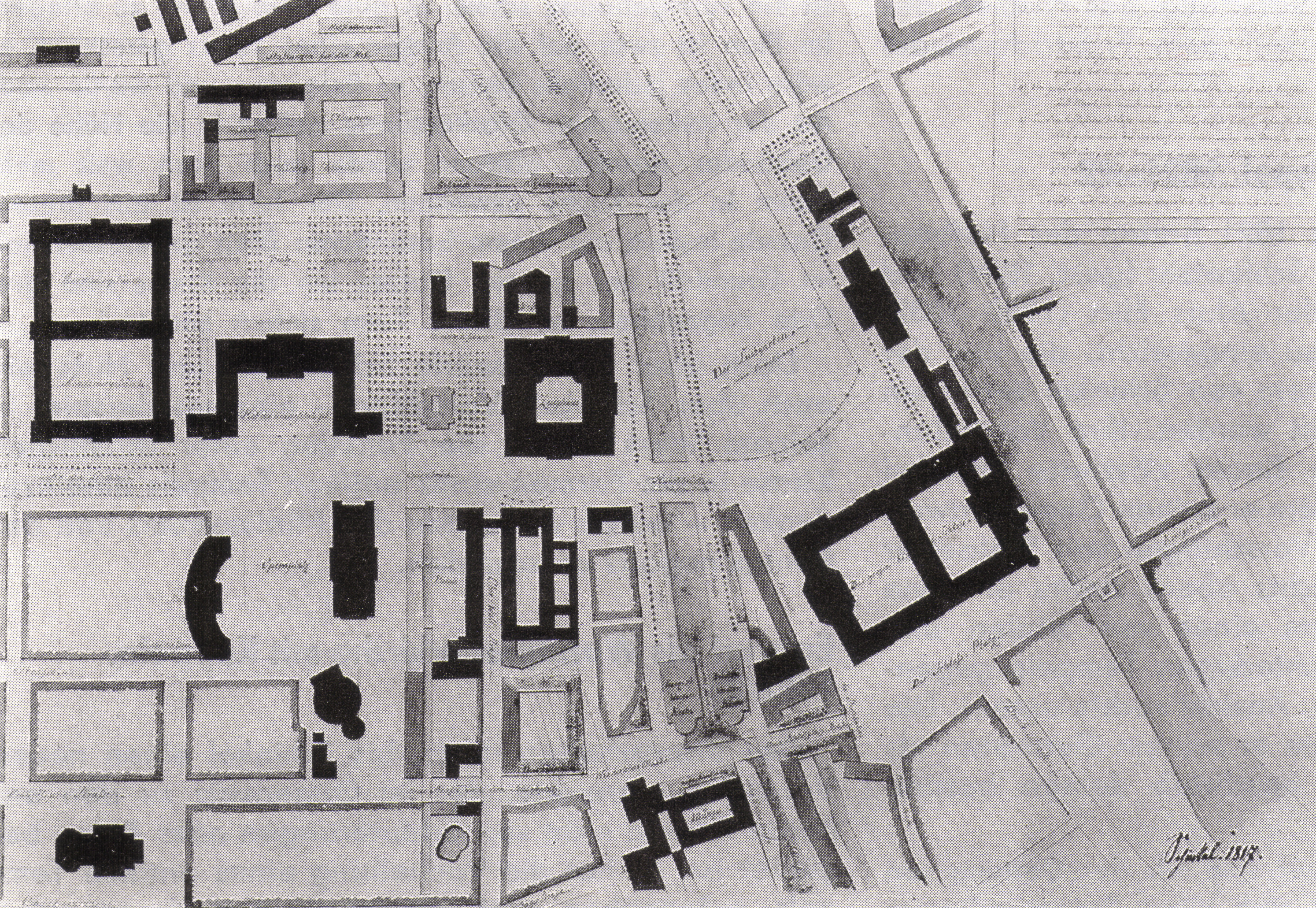 "Bebauungsplan von Berlin" (Ausschnitt) Karl Friedrich Schinkel, 1817, Feder, Schwarz aquarelliert, 77.0cm x 59,0cm Staatliche Museen zu Berlin(Ost), Nationalgalerie, SM 30.1 Die geplante Anlage mit zwei Kirchengebäuden befindet sich im unteren Drittel des Bildes etwa in Bildmitte